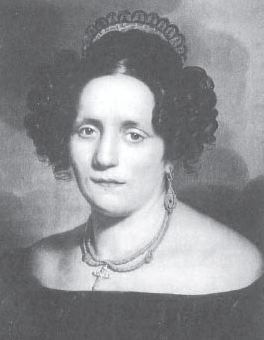 Magherita dall'aglio épouse de Giambattista Bodoni